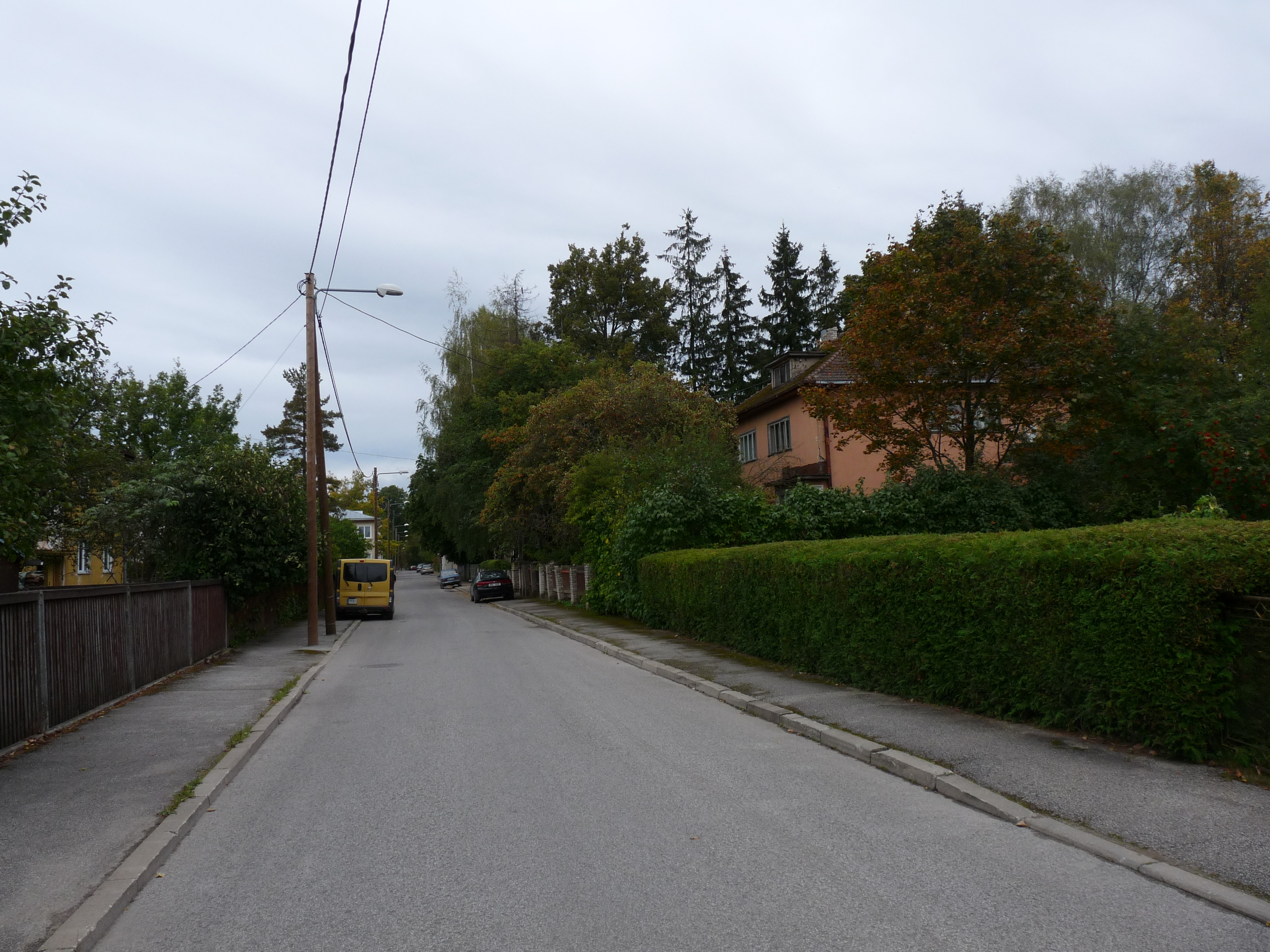 K. A. Hermanni tänava lõpp, Tartu, 22. september 2012